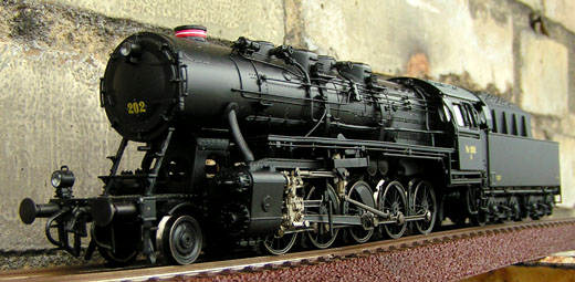 Model af DSBs damplokomotiv N 202, fremstillet af Roco i 2004. Skala H0. Billedet er publiceret og fotograferet af Occam fra og stilles til rådighed efter nedenstående licens.